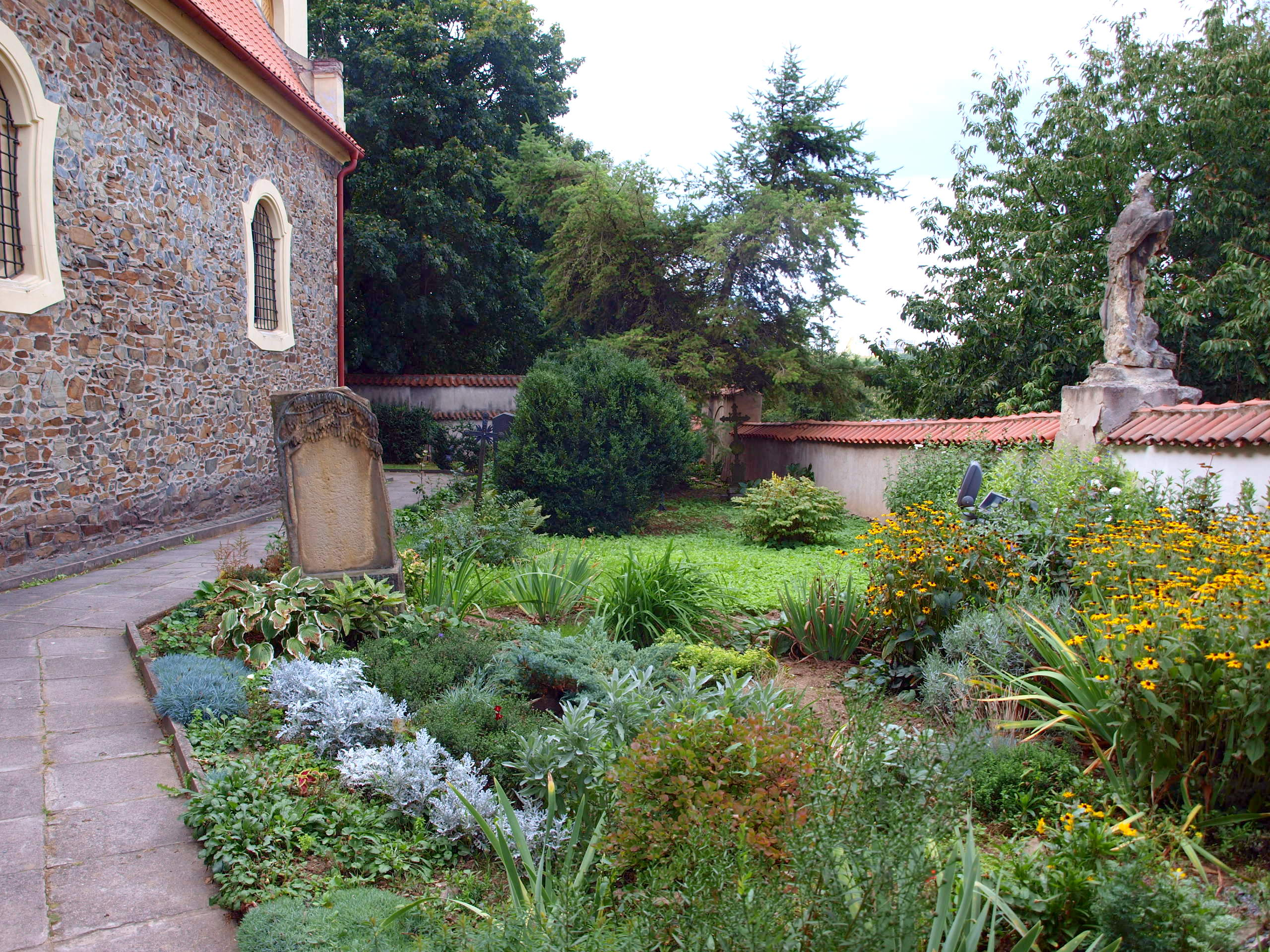 Praha-Petrovice, kostel sv. Jakuba Většího